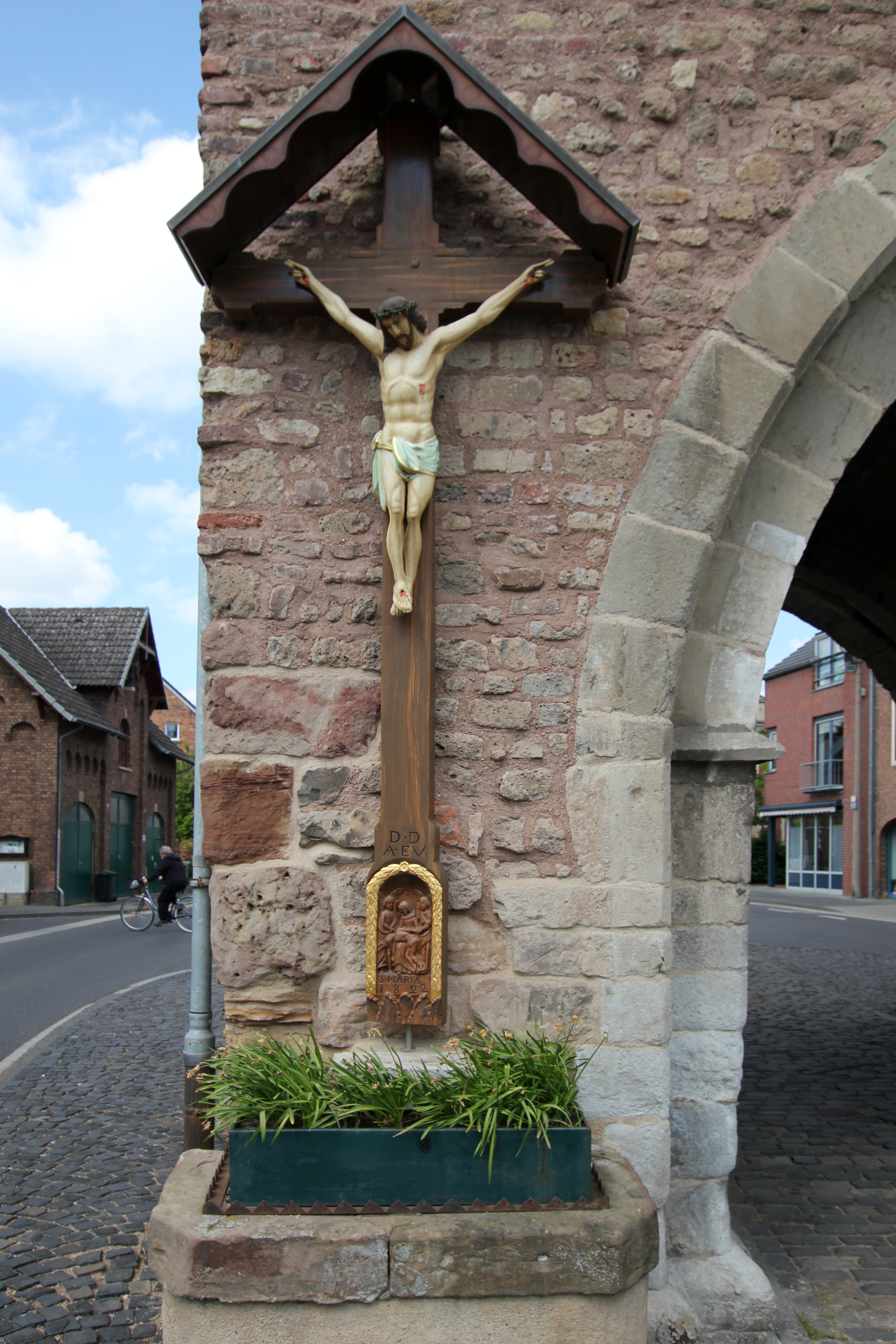 Erftstadt Lechenich, Herriger Tor. Kreuz mit der Jahresangabe 1822, Ersatz eines von Paul Clemen beschriebenen Steinkreuzzes